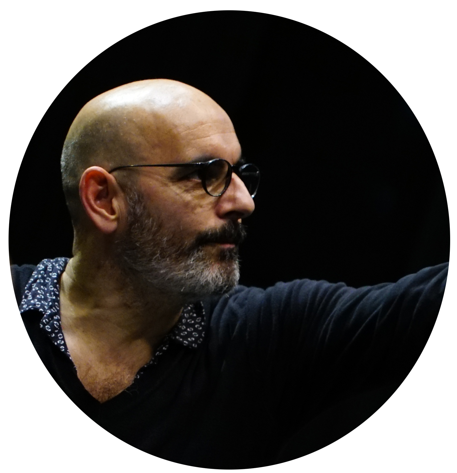 Vincent Boussard